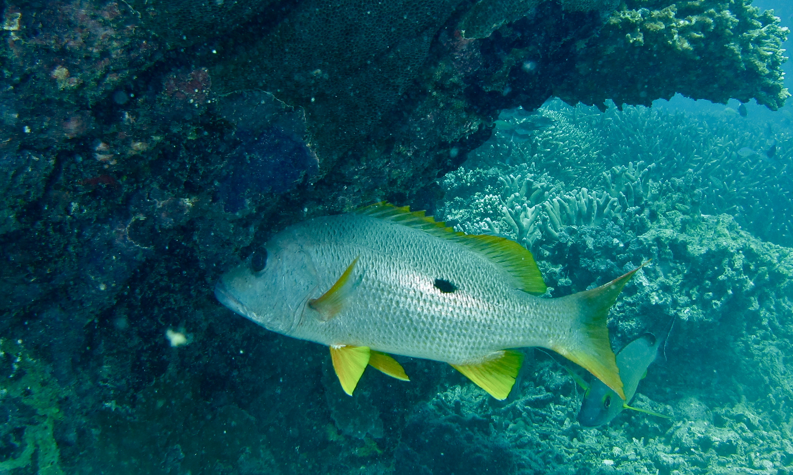 Turtle Patch, Sipadan, Sabah, MALAYSIA